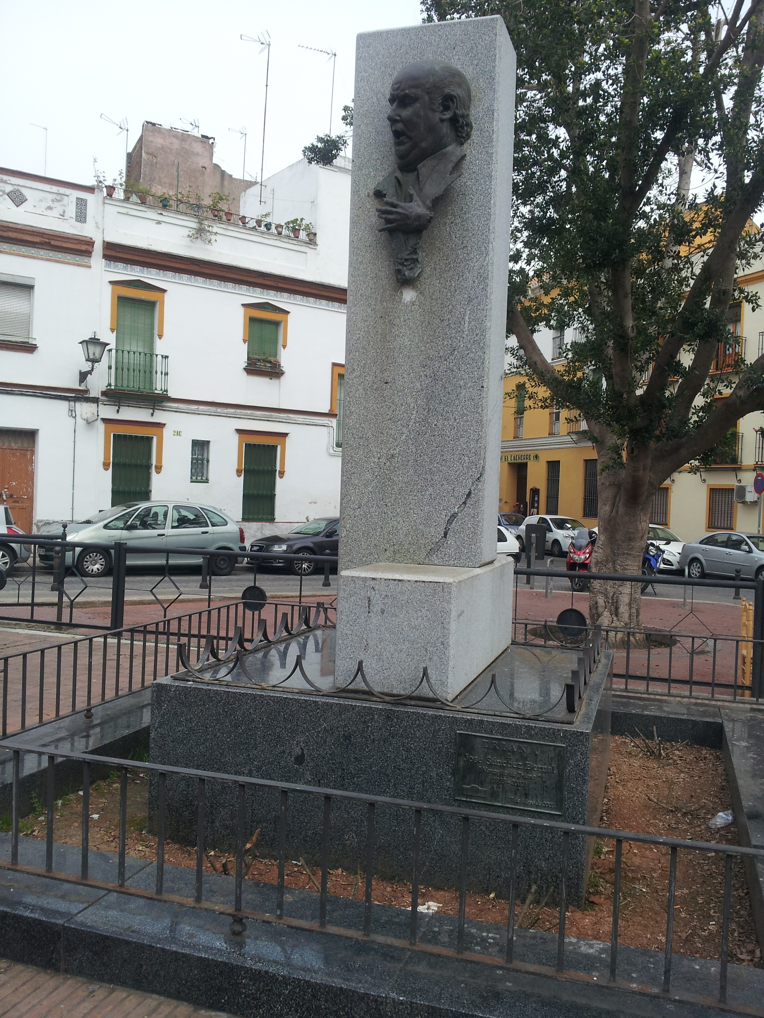 Monumento a José Sánchez Bernal "Naranjito de Triana" cantaor de flamenco, situada en el barrio sevillano de Triana, realizada por Augusto Morilla